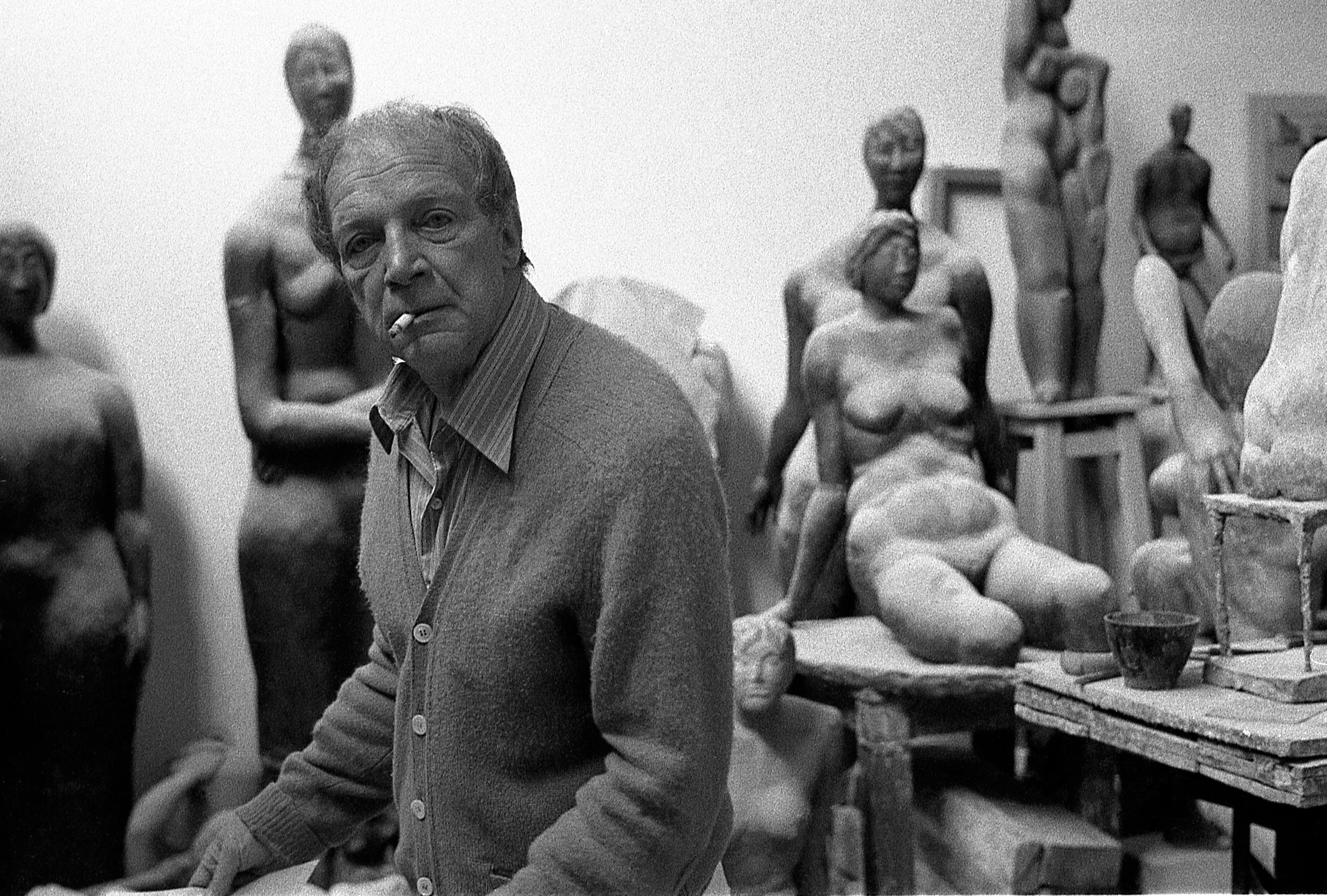 Maler